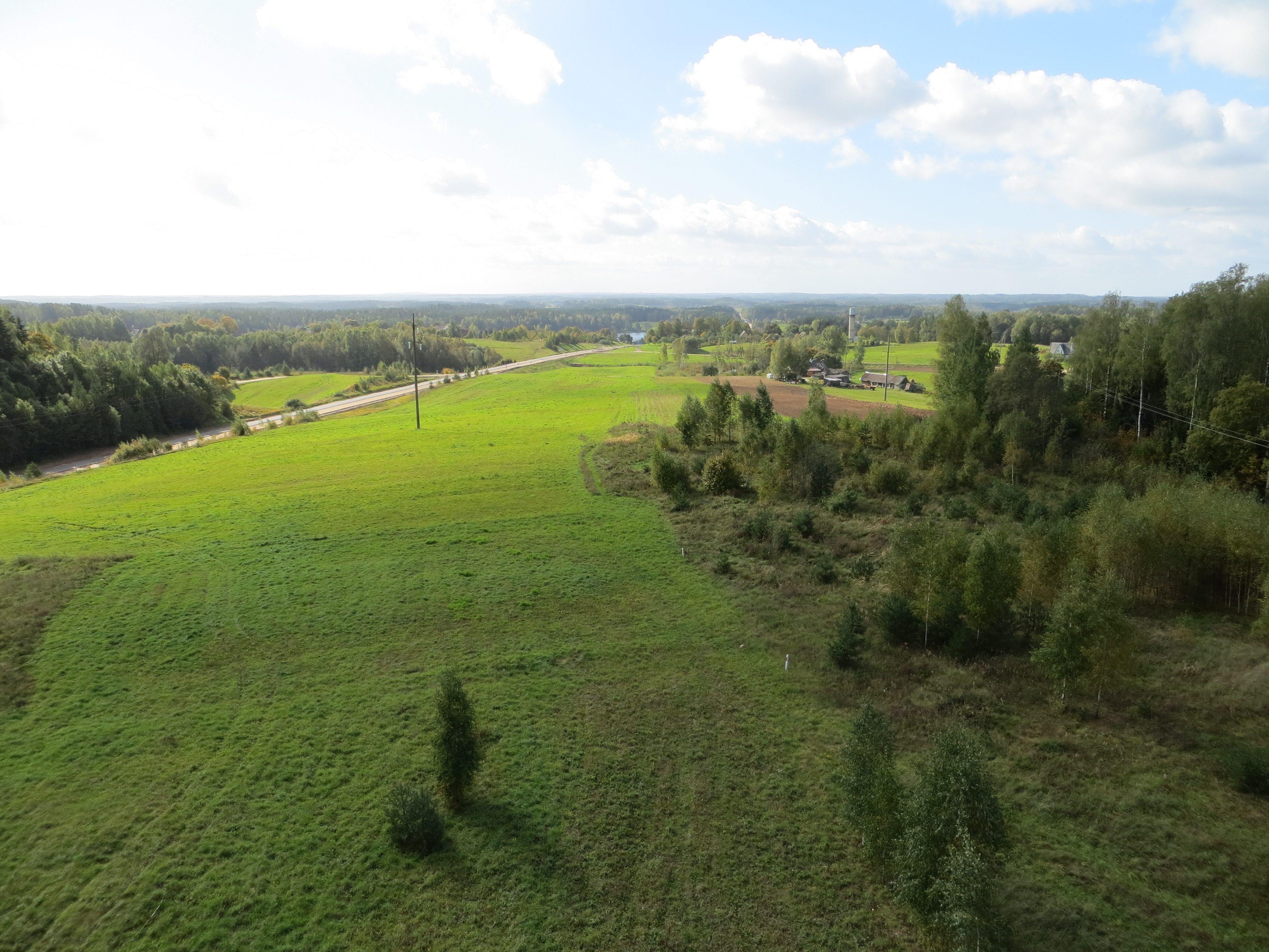 Degučių sen., Lithuania